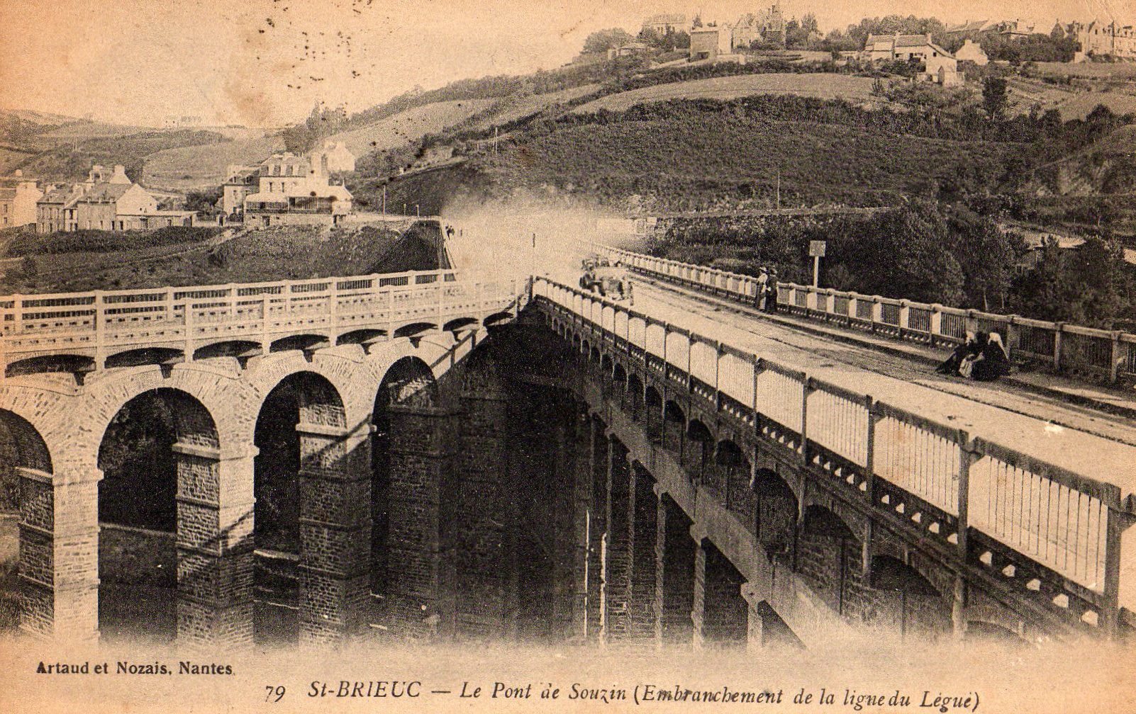 Carte postale ancienne éditée par Artaud et Nozais à Nantes, n°79:Saint-Brieuc : Le Pont de Souzain (Embranchement de la ligne du Légué).Viaduc de Souzain : décrochement de la ligne du Phare